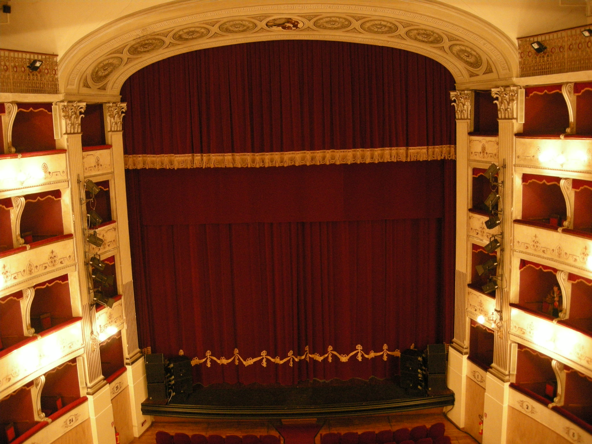 Teatro manzoni di pistoia, 01